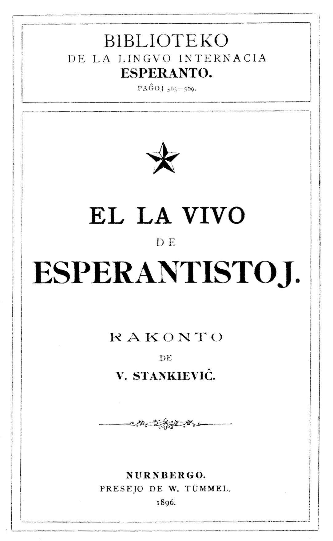 Kovrilo de la libro El la vivo de esperantistoj de V. F. Stankeviĉ